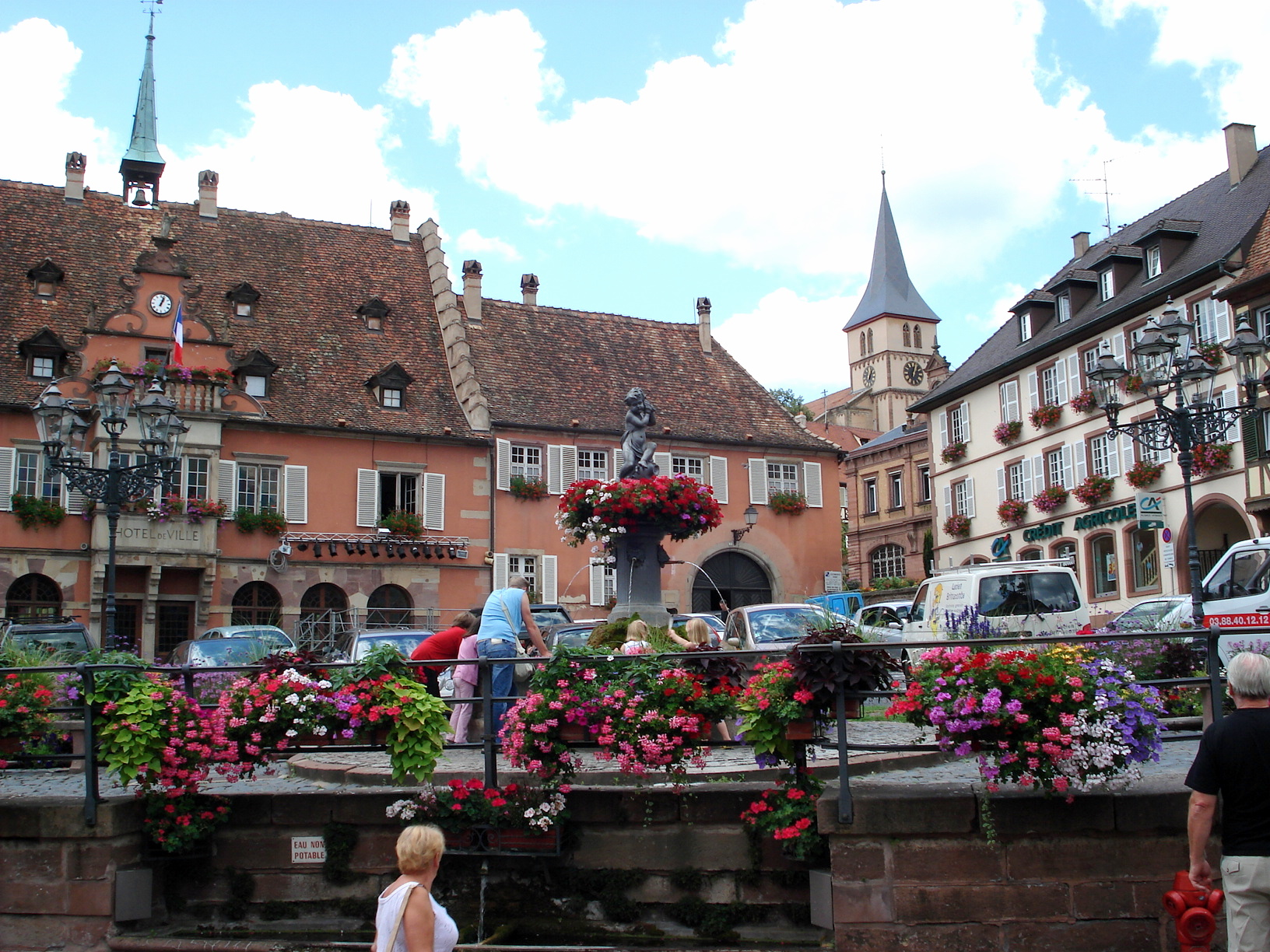 Barr, comm. du dép. du Bas-Rhin, France (région Alsace). Place de l'Hôtel de ville, angle nord-ouest, avec fontaine et façade de l'hôtel de ville (gauche).